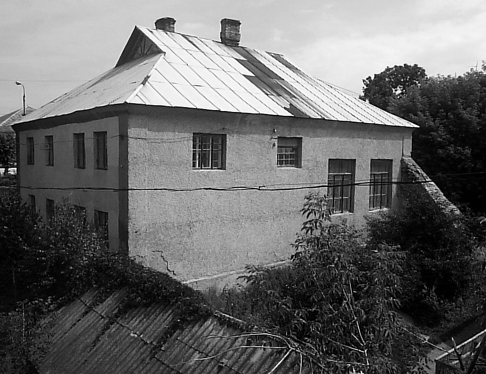 синагога у Новому Заславі